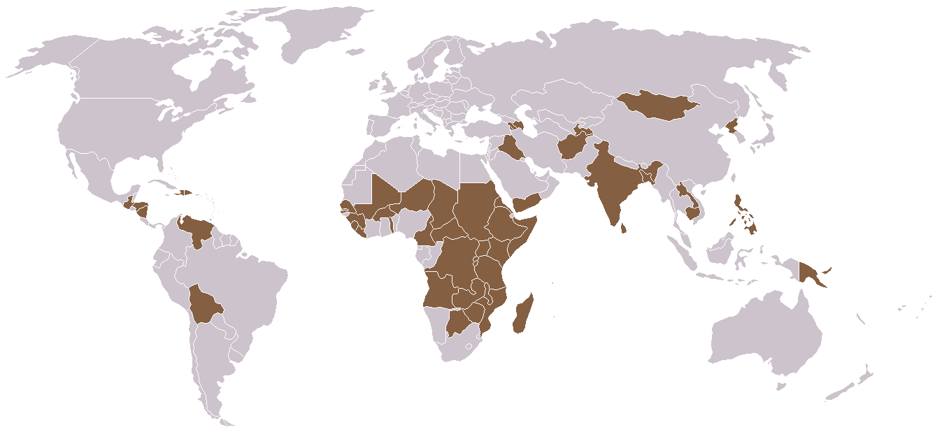 Karte der Staaten mit über 20 %-Anteil an unterernährten Menschen an der Gesamtbevölkerung.